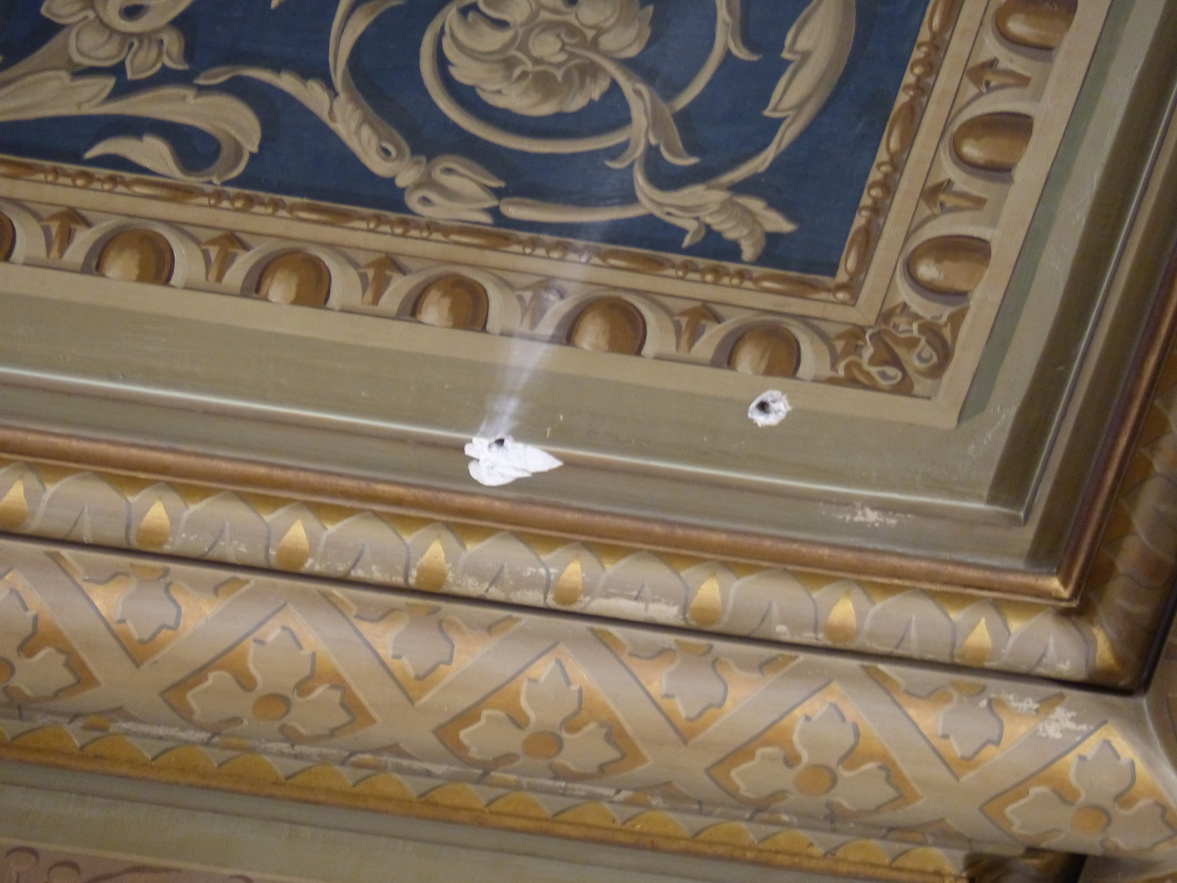 Congreso de los diputados, disparos del techo